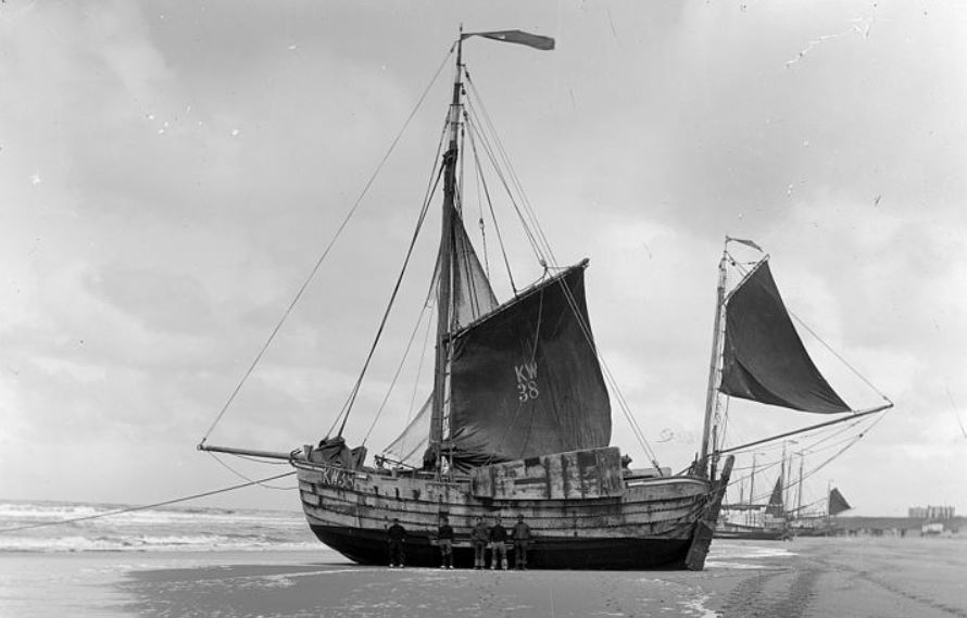 Bomschuit sur la plage du village de Katwijk aan Zee.